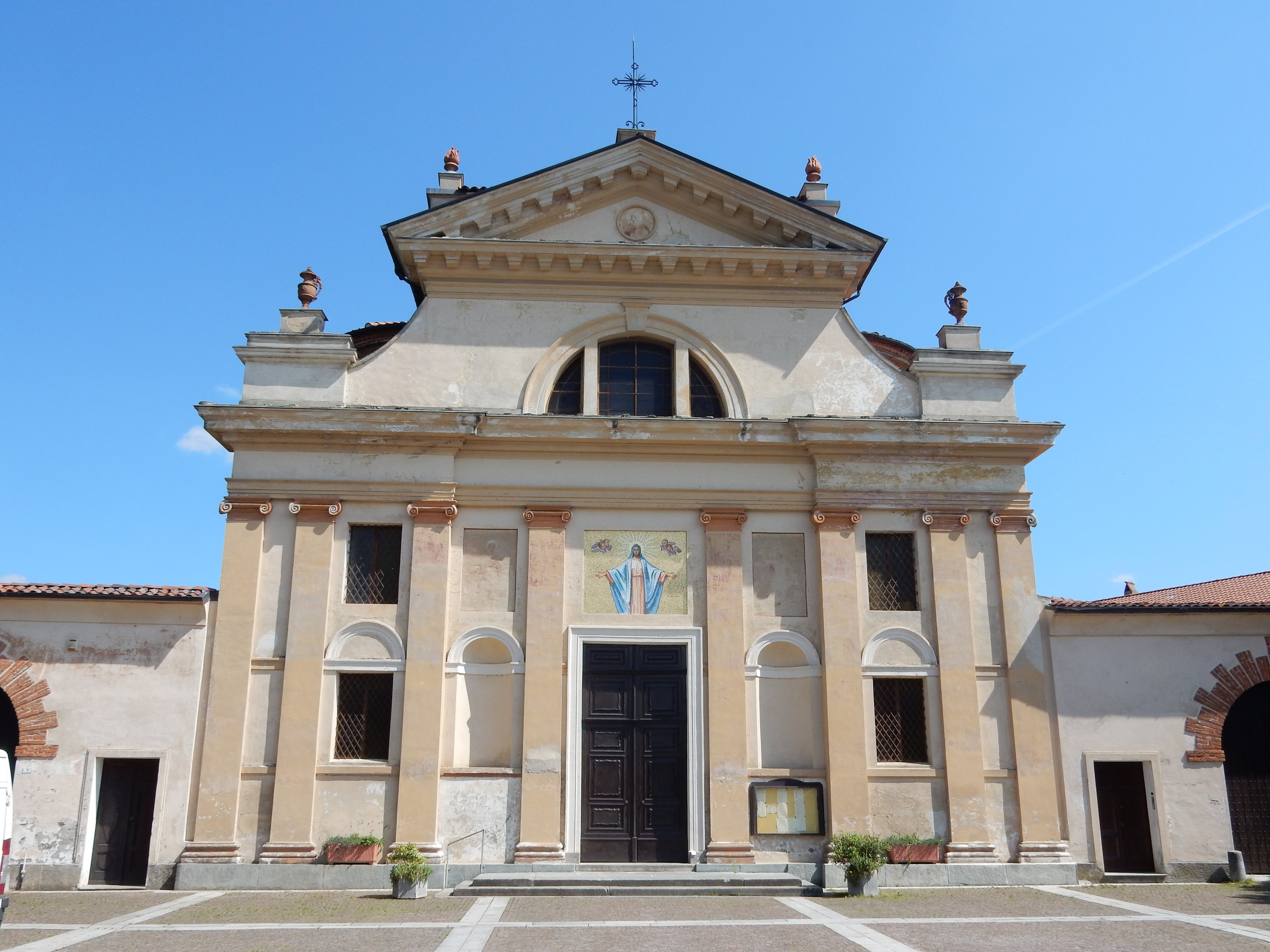 Parrocchiale S.Agapito